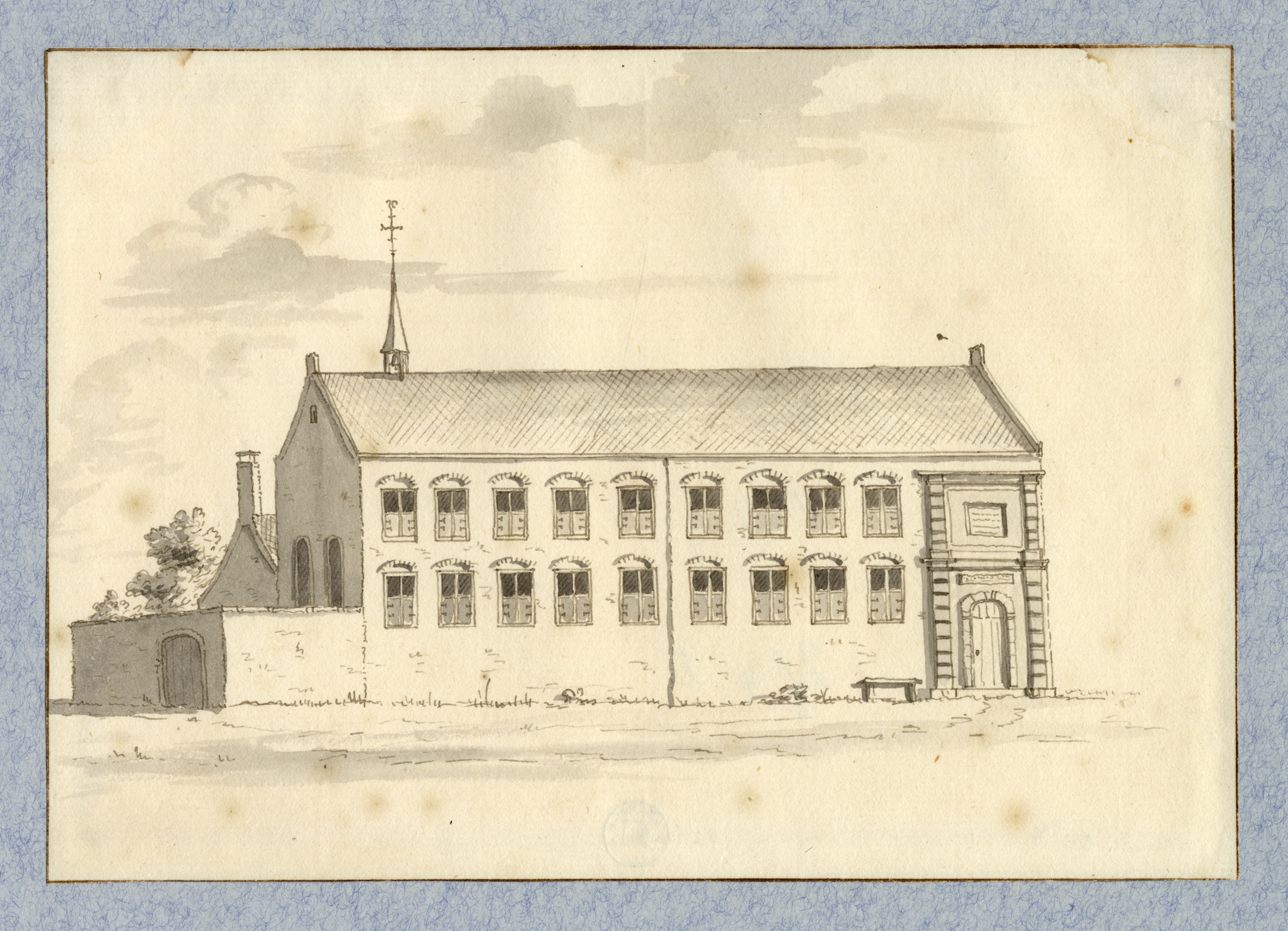 Gezicht op de voorgevel van het St.-Anthoniegasthuis 1725-1735 door Serrurier, L.P. pen en penseel in grijs ( breedte: 198 hoogte: 139 )